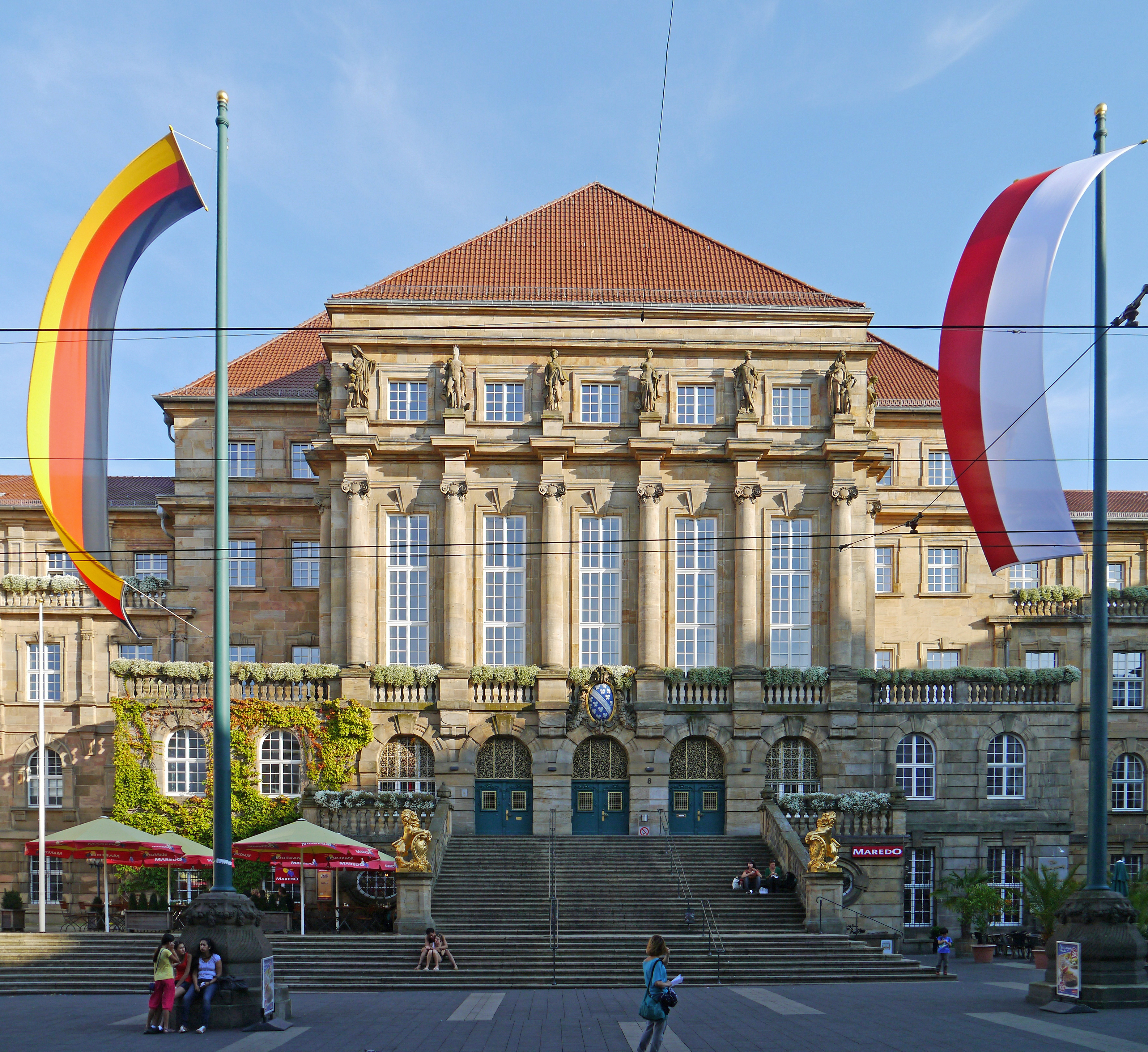 Das Kasseler Rathaus, 2012, an der "Obere-Königstraße" in Kassel.